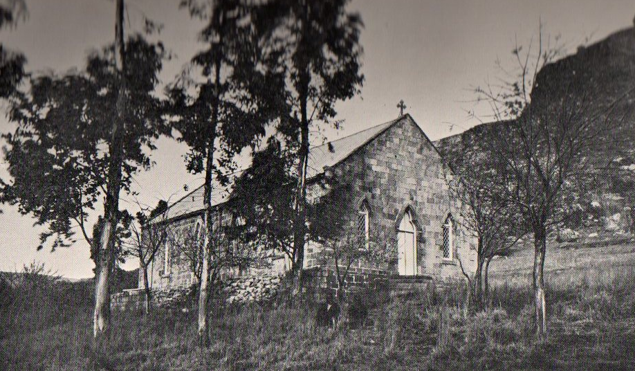 Photo du temple de Léribé.